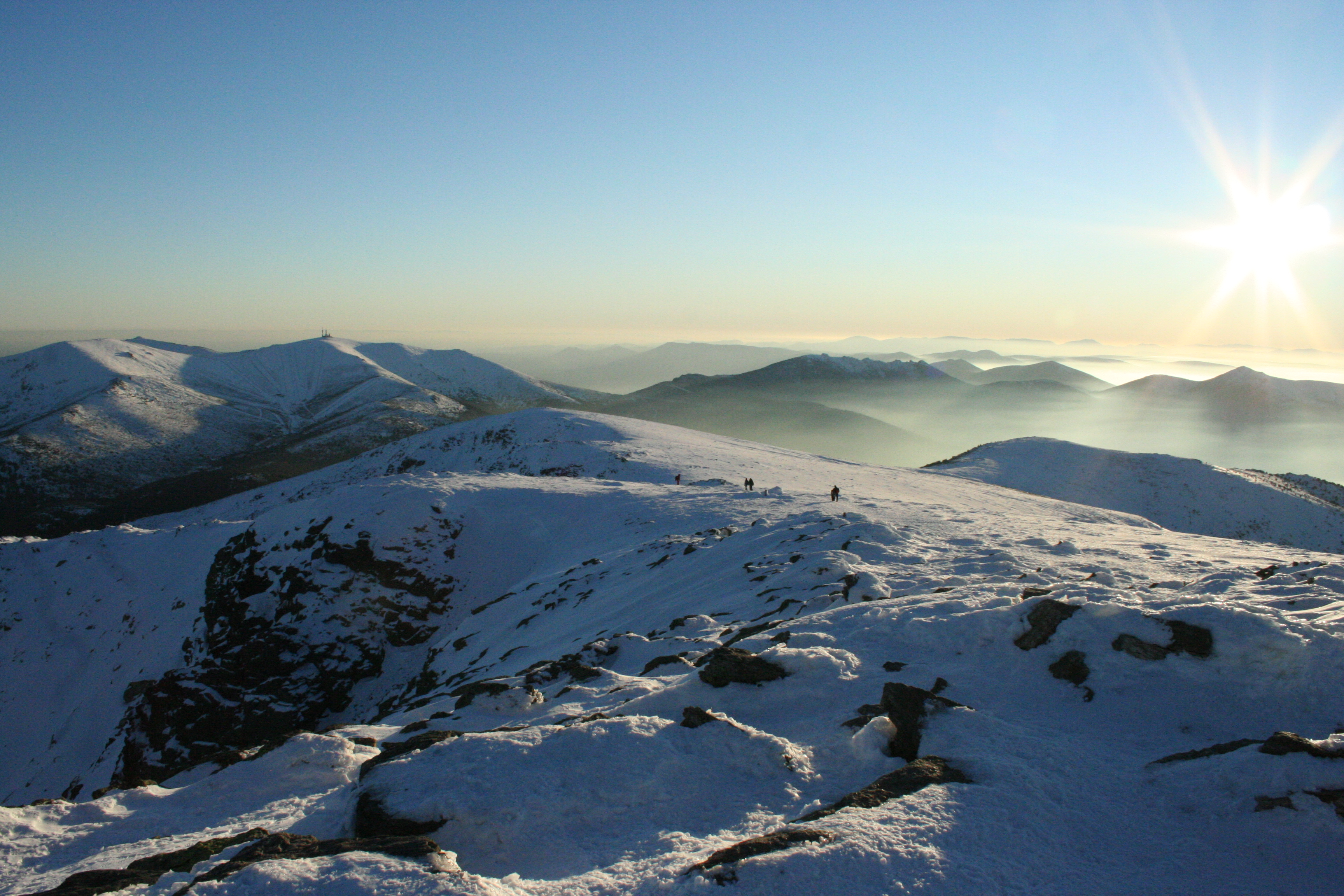 Puesta de Sol en Peñalara Puesta de sol en Peñalara, sierra de Guadarrama, España.